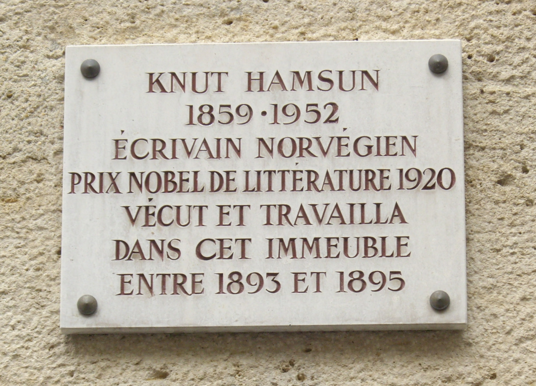 Plaque apposée au n° 8 de la rue de Vaugirard, Paris 6e, où vécut et travailla l'écrivain Knut Hamsun (1859-1952) entre 1893 et 1895.